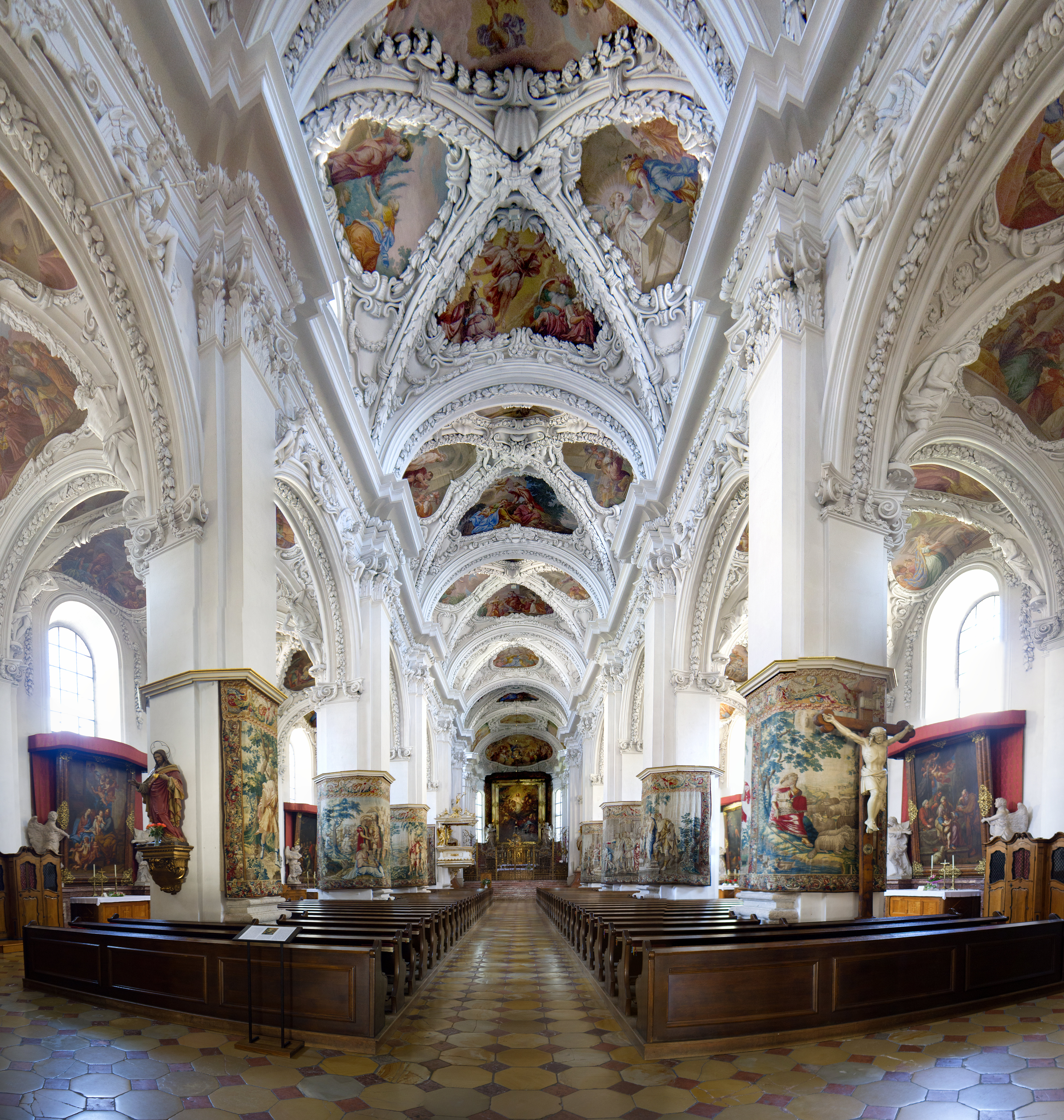 Gesamtanlage Stift Kremsmünster und Stiftskirche Göttlicher Heiland